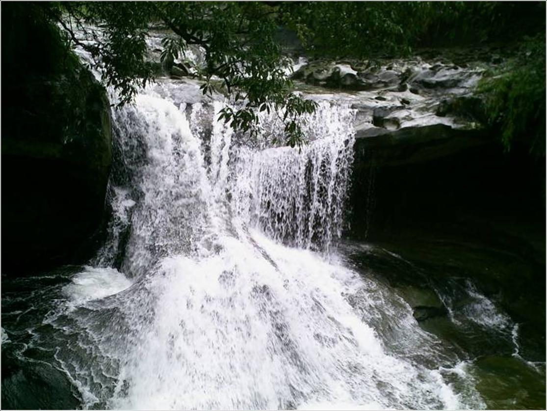 中文（台灣）: 眼鏡洞瀑布。